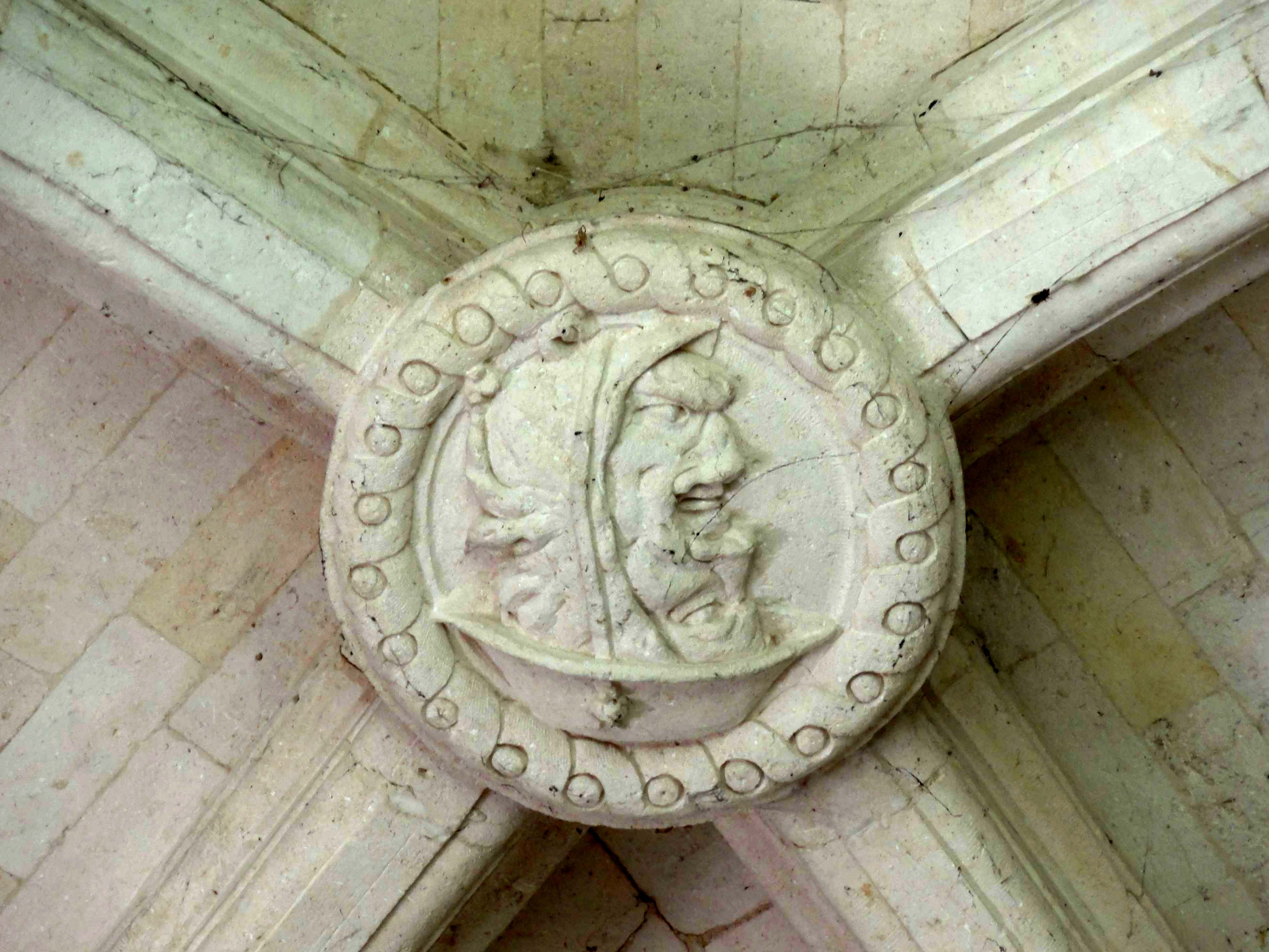 Clé de voûte (voir titre).